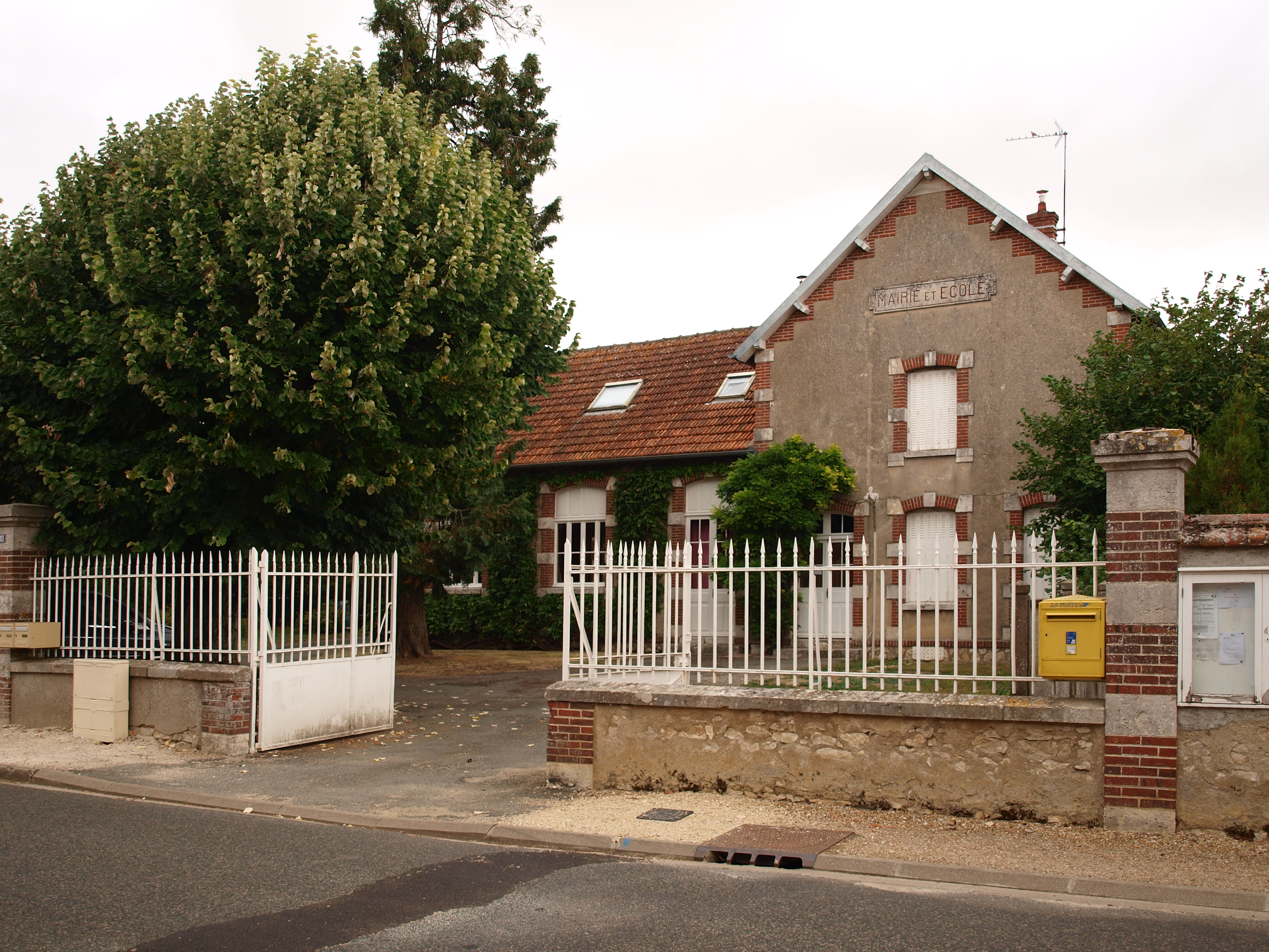 Saint-Cloud-en-Dunois (Eure-et-Loir, France) ; mairie